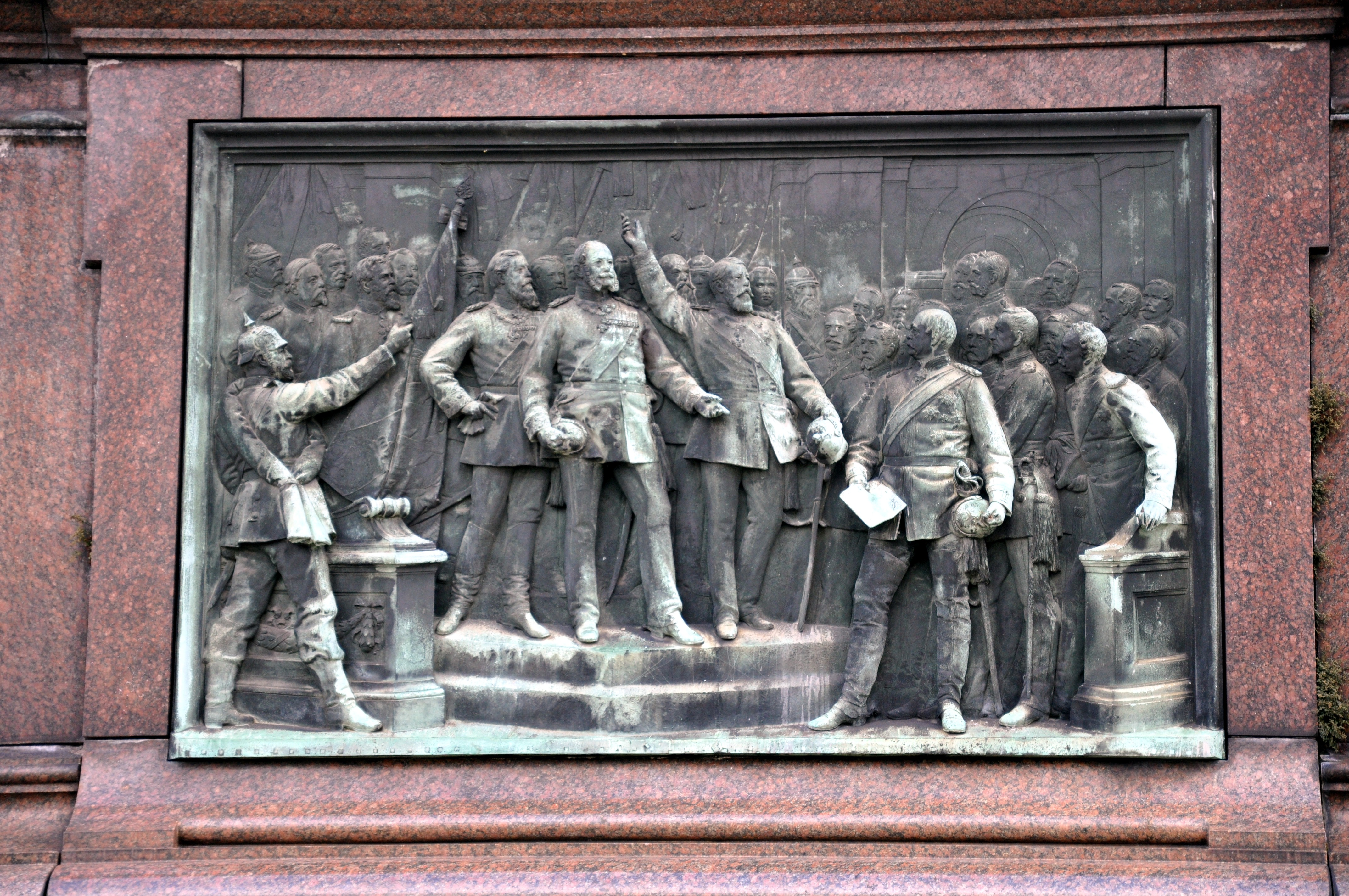 Karlsruhe, Kaiser-Wilhelm-Denkmal - Relief, Motiv: Kaiserproklamation in Versailles Abgebildet sind unter anderem (von links nach rechts) Kronprinz Friedrich Wilhelm von Preußen, Kaiser Wilhelm, Großherzog Friedrich von Baden, Bundeskanzler Graf Bismarck und General v. Moltke.